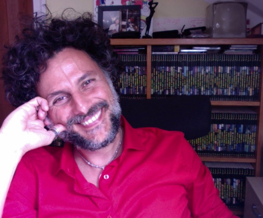 Lorenzo Calza in una foto del 2019